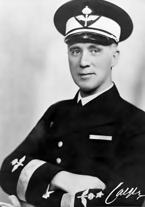 Porträttfotografi av Arthur Örnberg. Roslagens flygflottilj (F 2) första chef. Tillhör F 2-samlingen med nummer F2 FM 500. Ur Flygvapenmuseums bildarkiv.